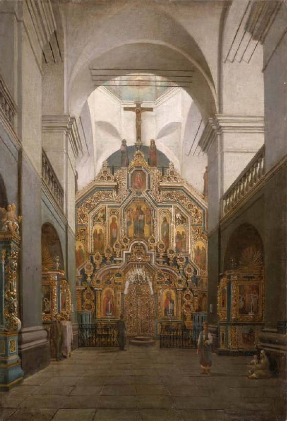 Innenraum der Preobraschenski-Kathedrale des Klosters Kiewo-Meschigorski Spasso-Preobraschenski.